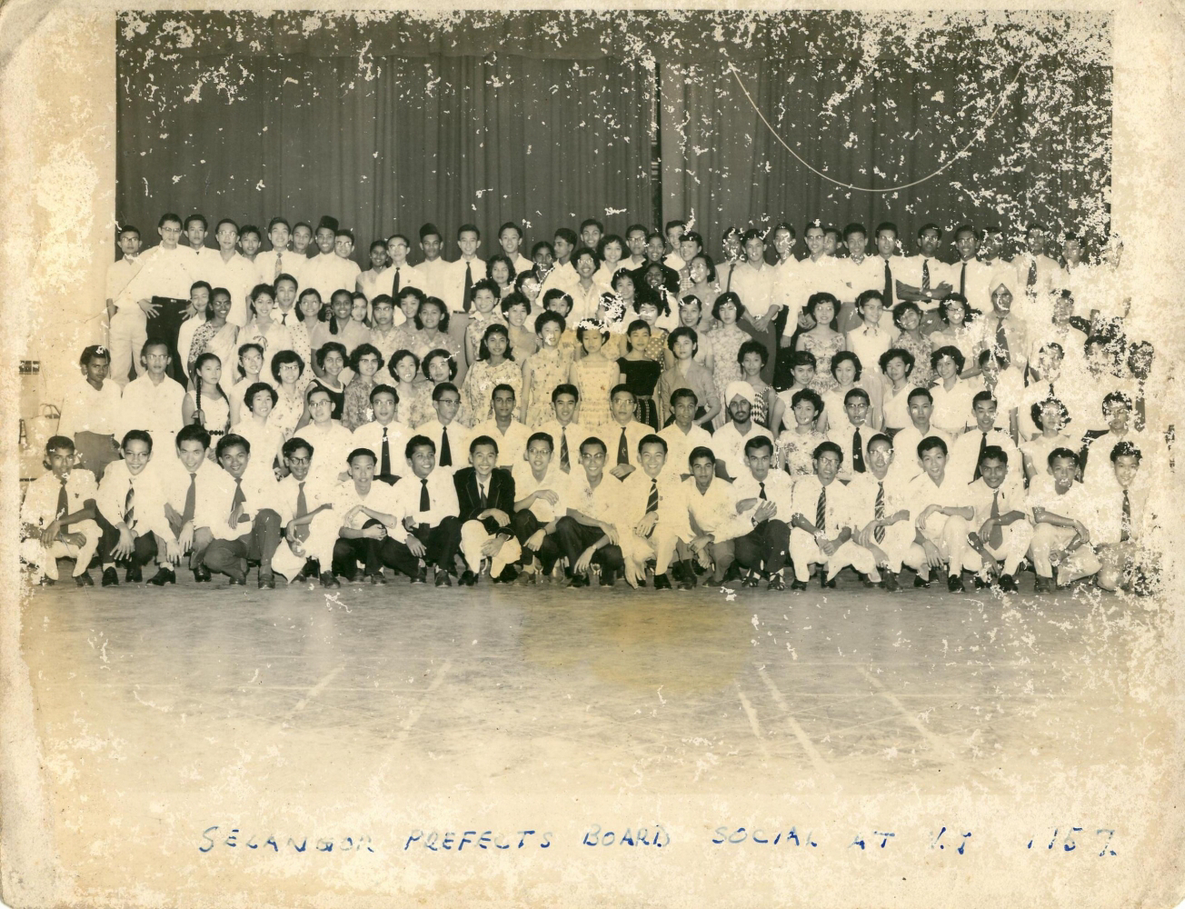 Hari Sosial Lembaga Pengawas di Victoria Institution, 1957